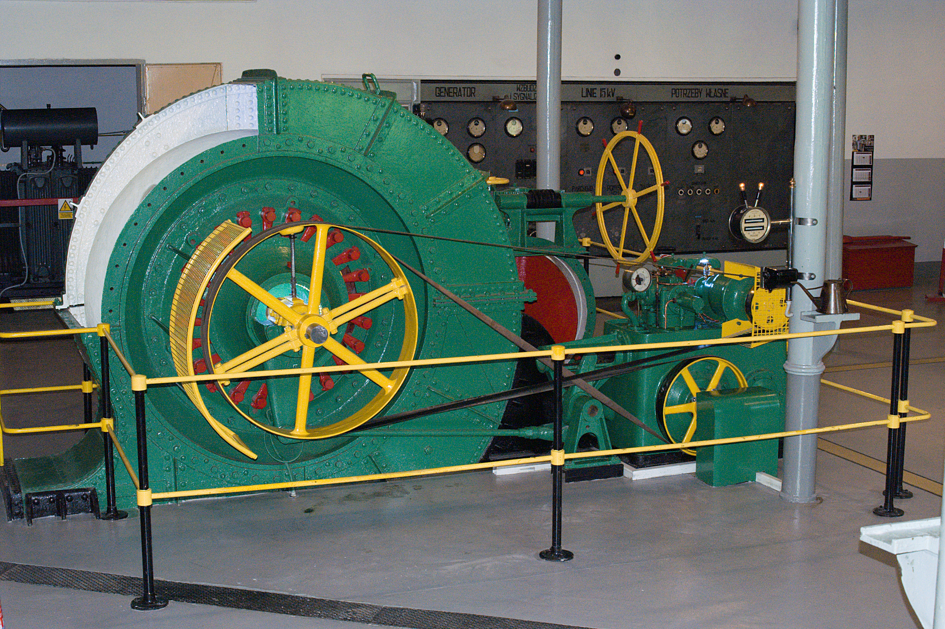 Elktrownia wodna Struga.